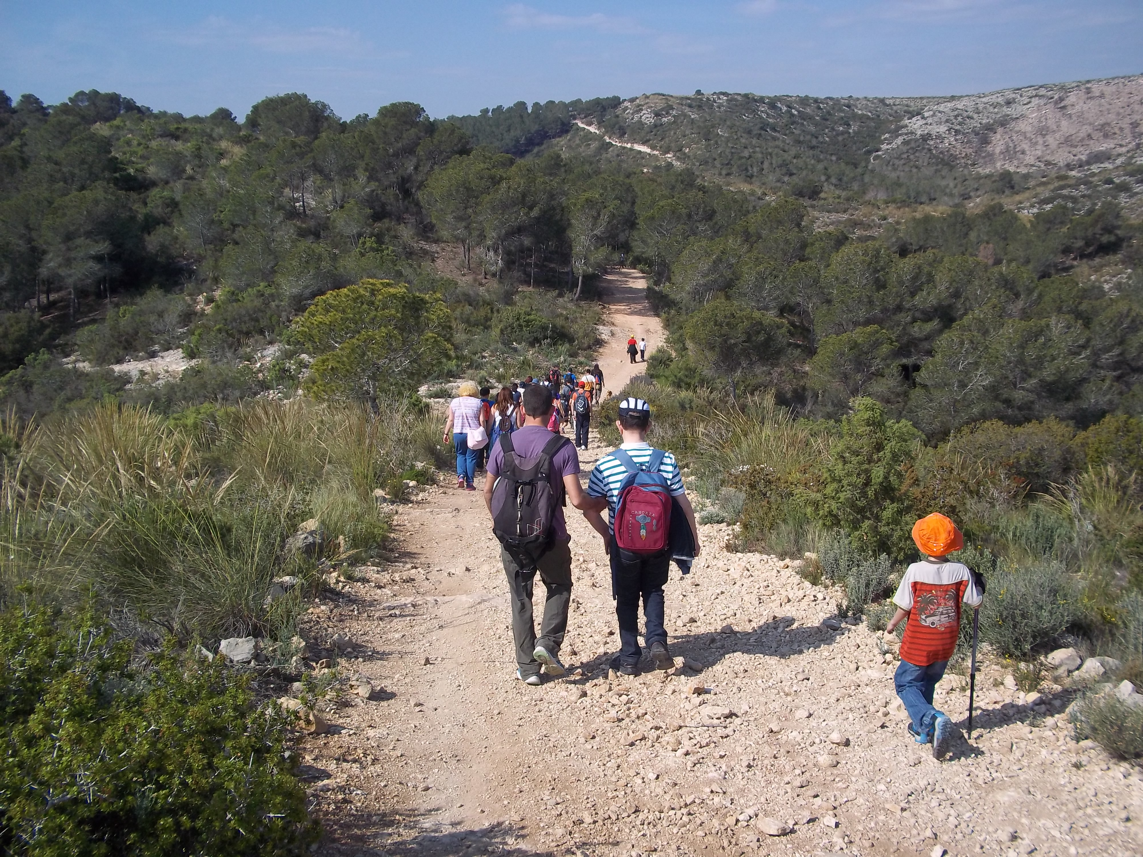 Camí dels granerers a la Serra Perenxisa, voluntariat ambiental Xarxa 2015